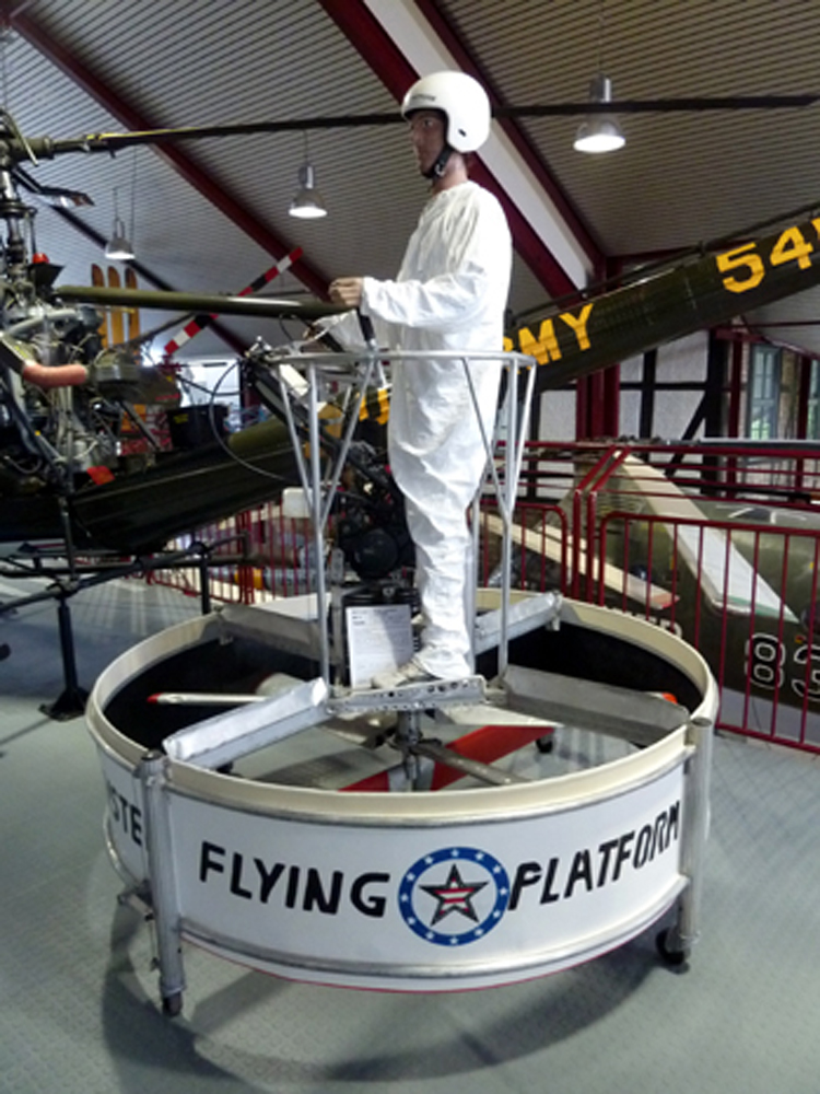 Hiller VZ-1 PAWNEE Flying Platform - Nachbau im Hubschraubermuseum Bückeburg